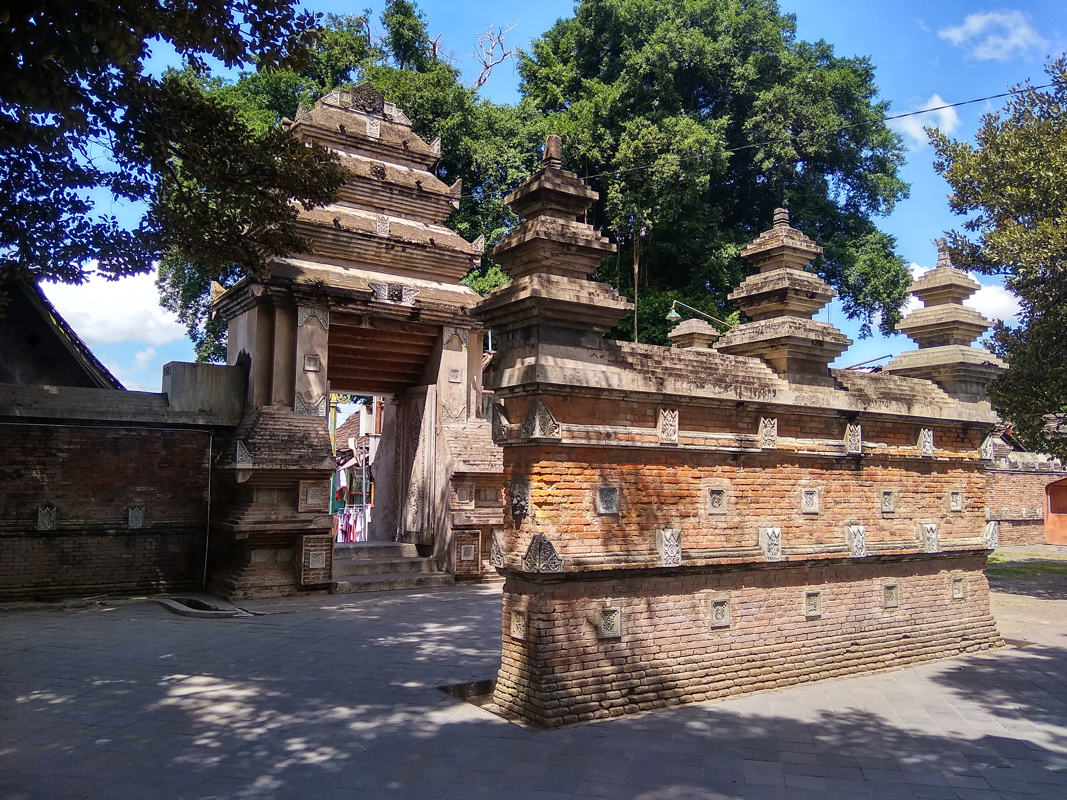 Masjid Mataram Kotagede, masjid tertua di Yogyakarta.